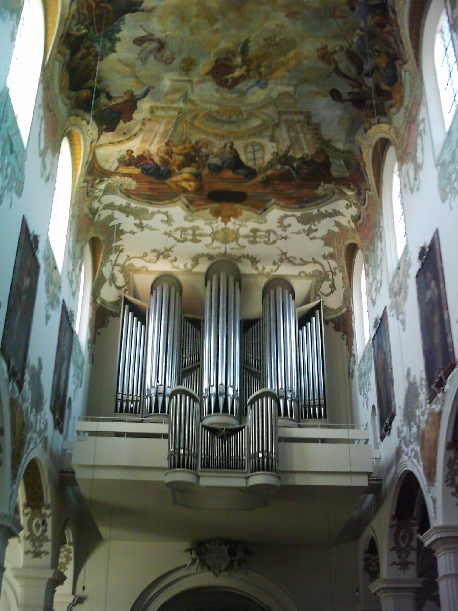 Hauptorgel der Stadtpfarrkirche St. Martin, 88400 Biberach an der Riss, Baden-Württemberg